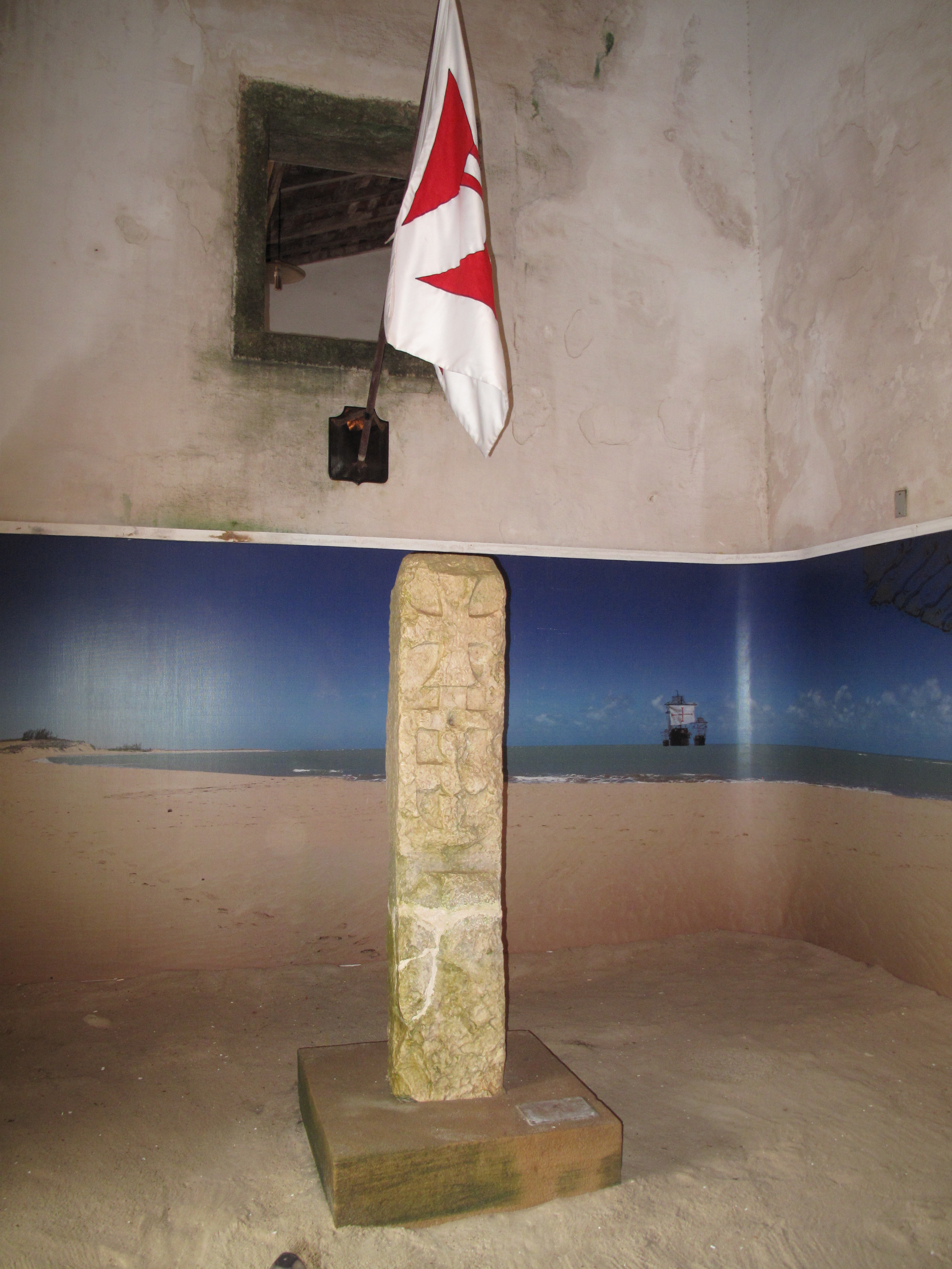 Marco Colonial de Touros, primeiro registro de presença portuguesa no país. Localizado no Forte dos Reis Magos, em Natal.